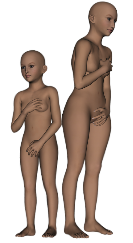 नेपाली: लाटी धमाला र साउनी धमाला=लाटीमाला साउनीमाला . राजा नरसिंह मल्लका पुत्र(नाम नखुलेको)ले गाइले धान खाएको विषयमा (हाल जिपु) धमलाकि छोरि साउनीमाला र लाटिमाला नामकि दुइ युवतीलाइ सजाय स्वरुप कपडा खोलेर बाजा बजाएर पालाकोट राज्यका सारा जनाता माँझ नाङ्गै घुमाएकोले पिडा सहन नसकि विष खाएर आत्महत्या गरेका थिए.